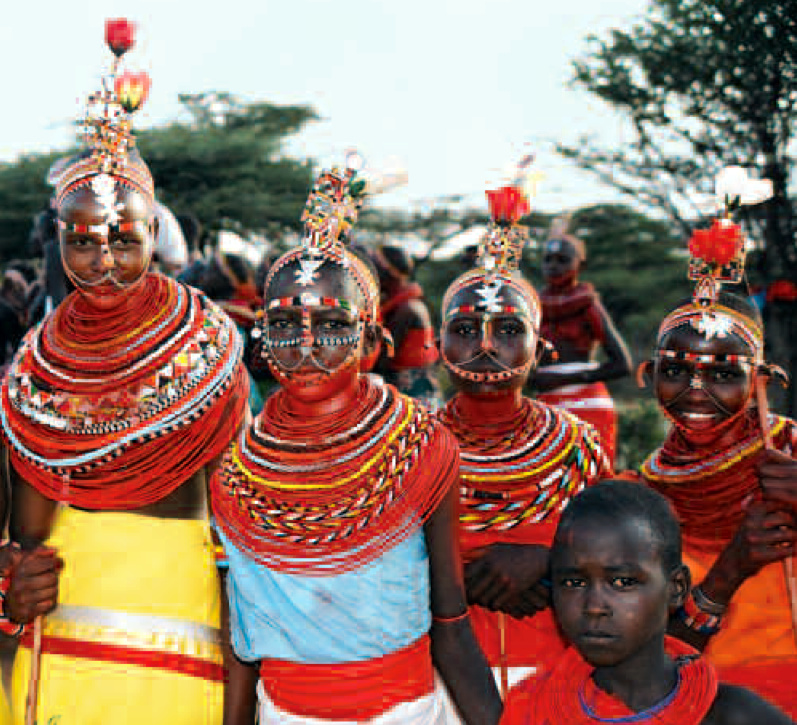 Samburu female circumcision ceremony, Laikipia, northern Kenya.